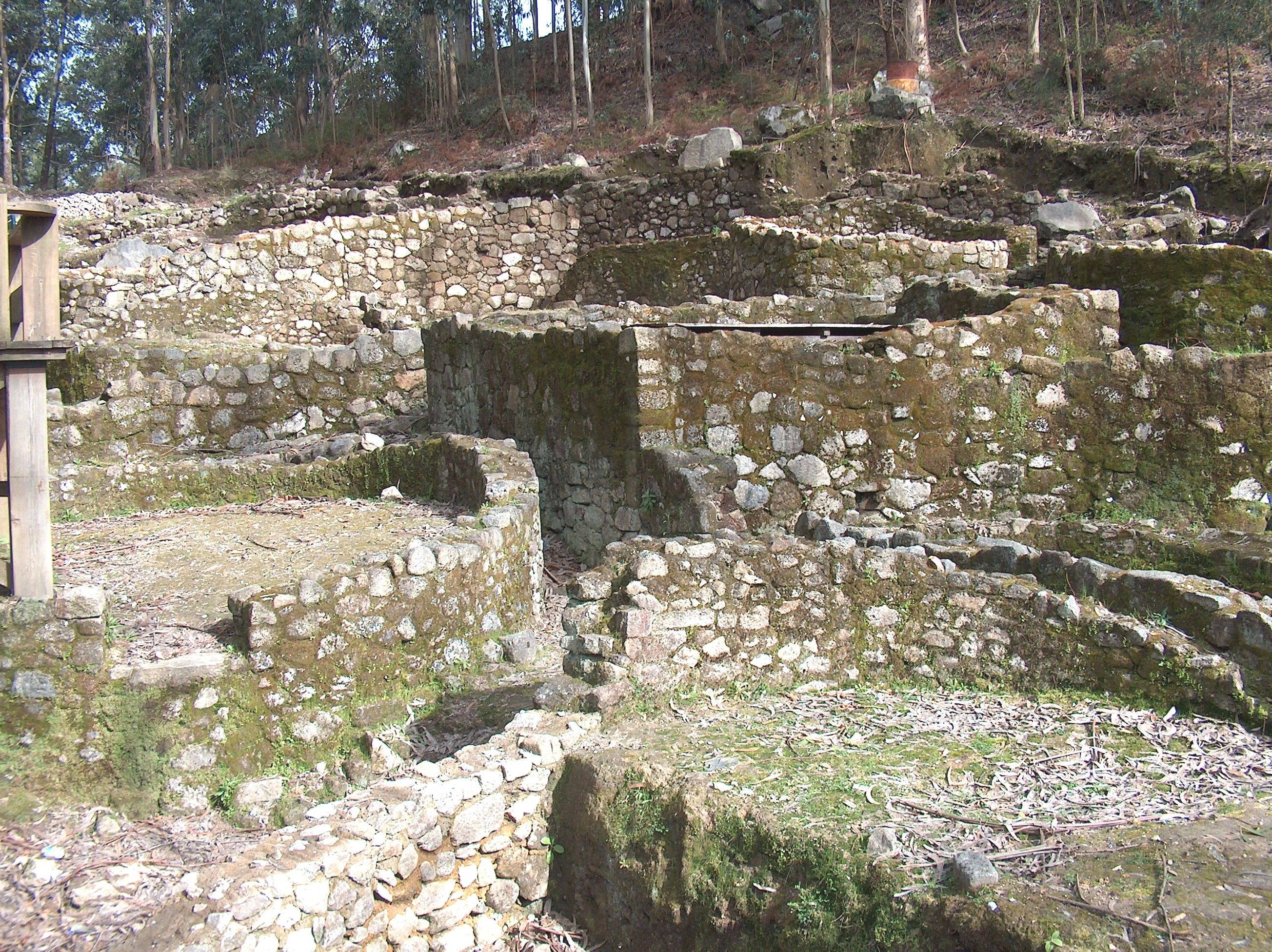 Castro de São Lourenço. Castro de São Lourenço, na freguesia de Vila Chã,concelho de Esposende, distrito de Braga, Portugal.